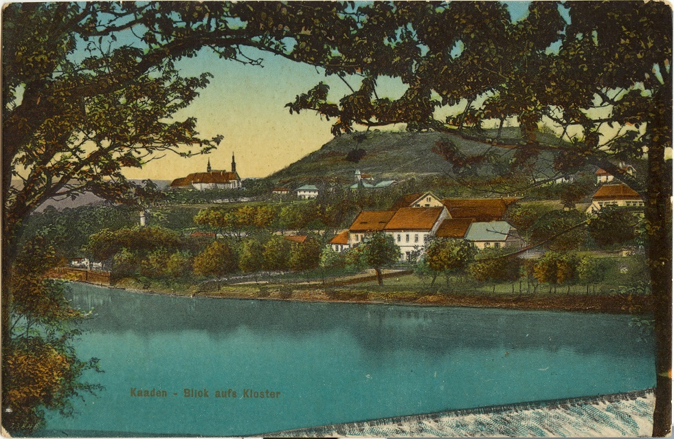 Sedlecké předměstí v Kadani (kolem 1900)